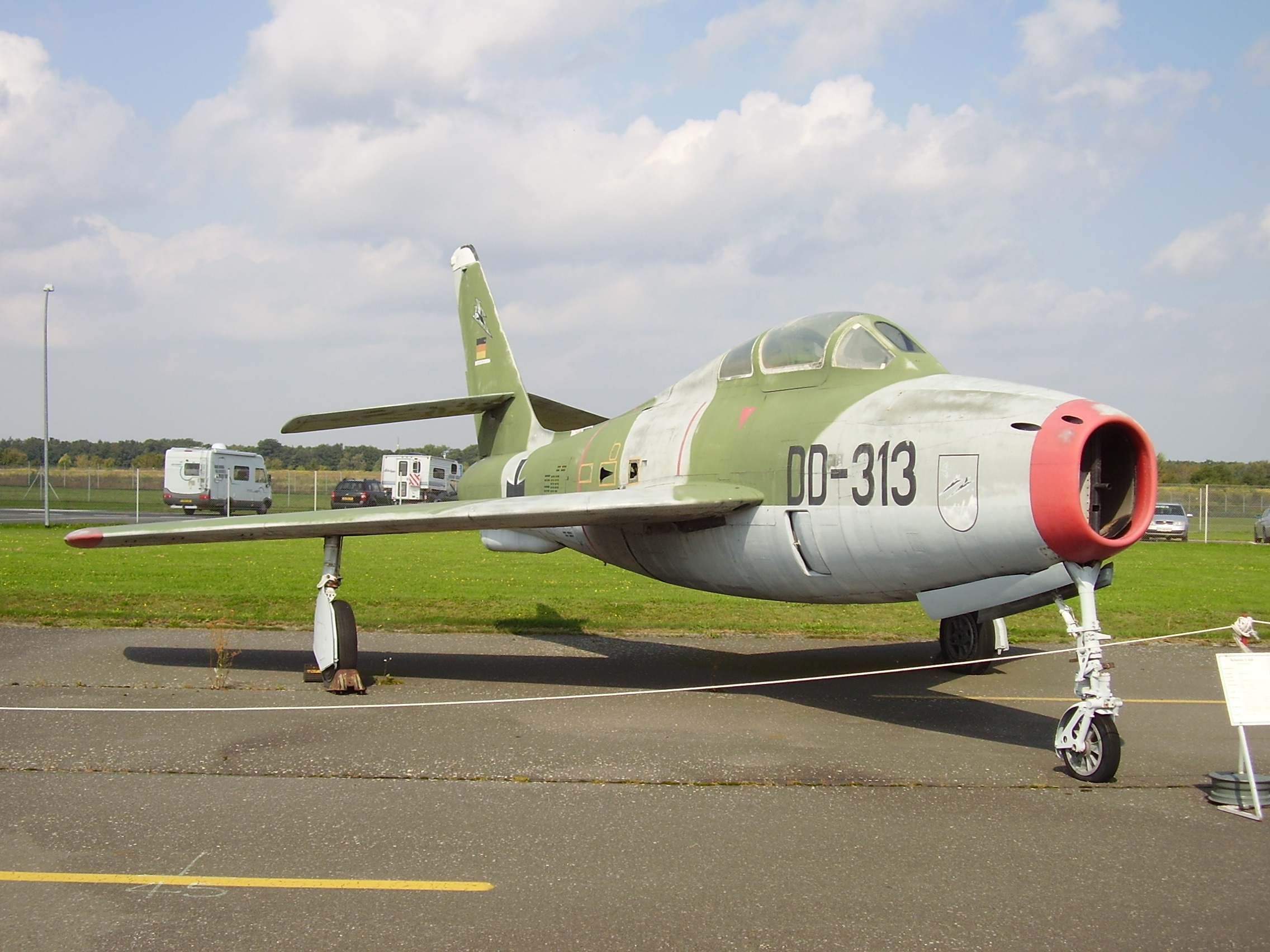 Luftwaffenmuseum der Bundeswehr; Airforce Museum of the Bundeswehr; Berlin-Gatow, F-84F